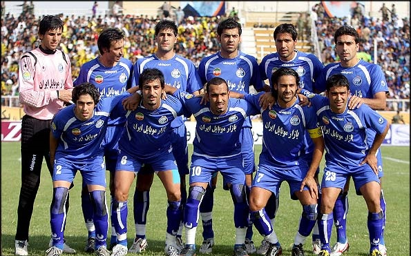 لیگ برتر - ورزشگاه حافظیه